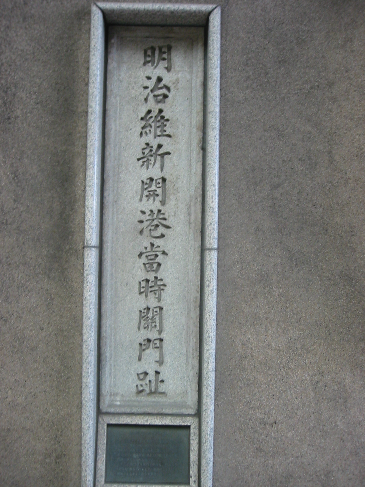 明治維新開港当時関門跡 明治になって撤去された居留地西関門跡 神戸元町商店街にて